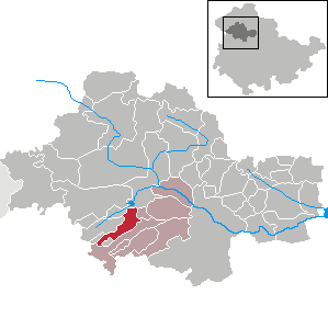 Flarchheim in Thuringia - Unstrut-Hainich-Kreis